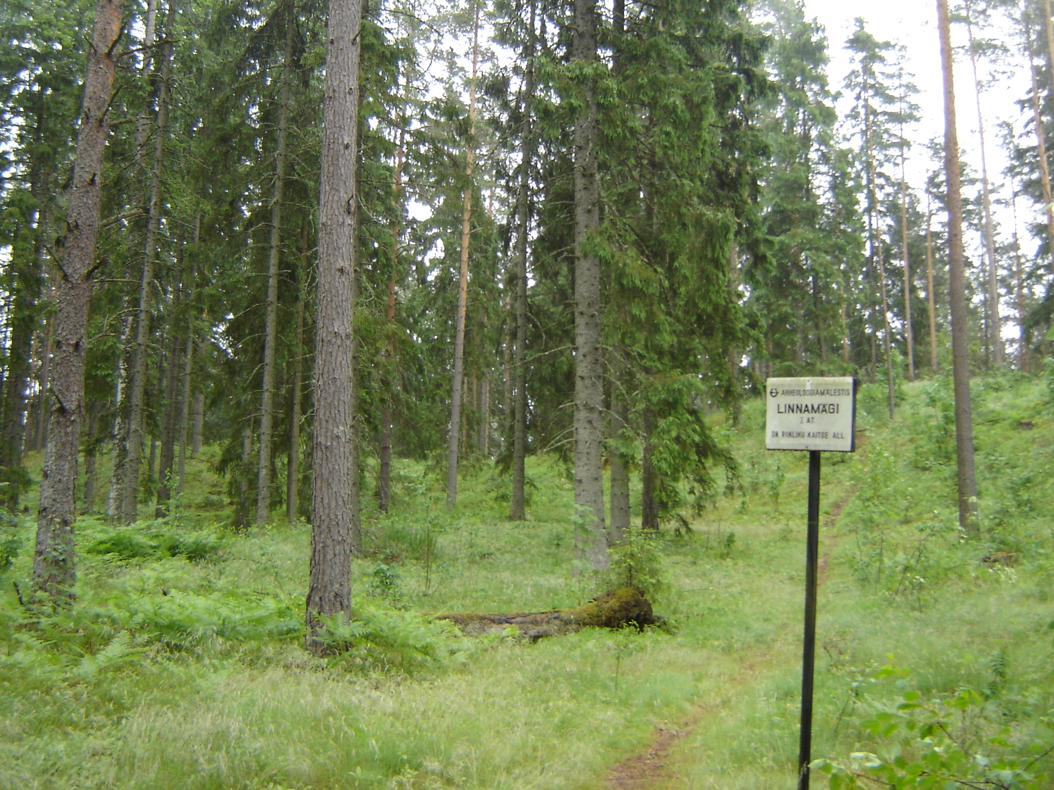 Teeviit Mädara linnamäele